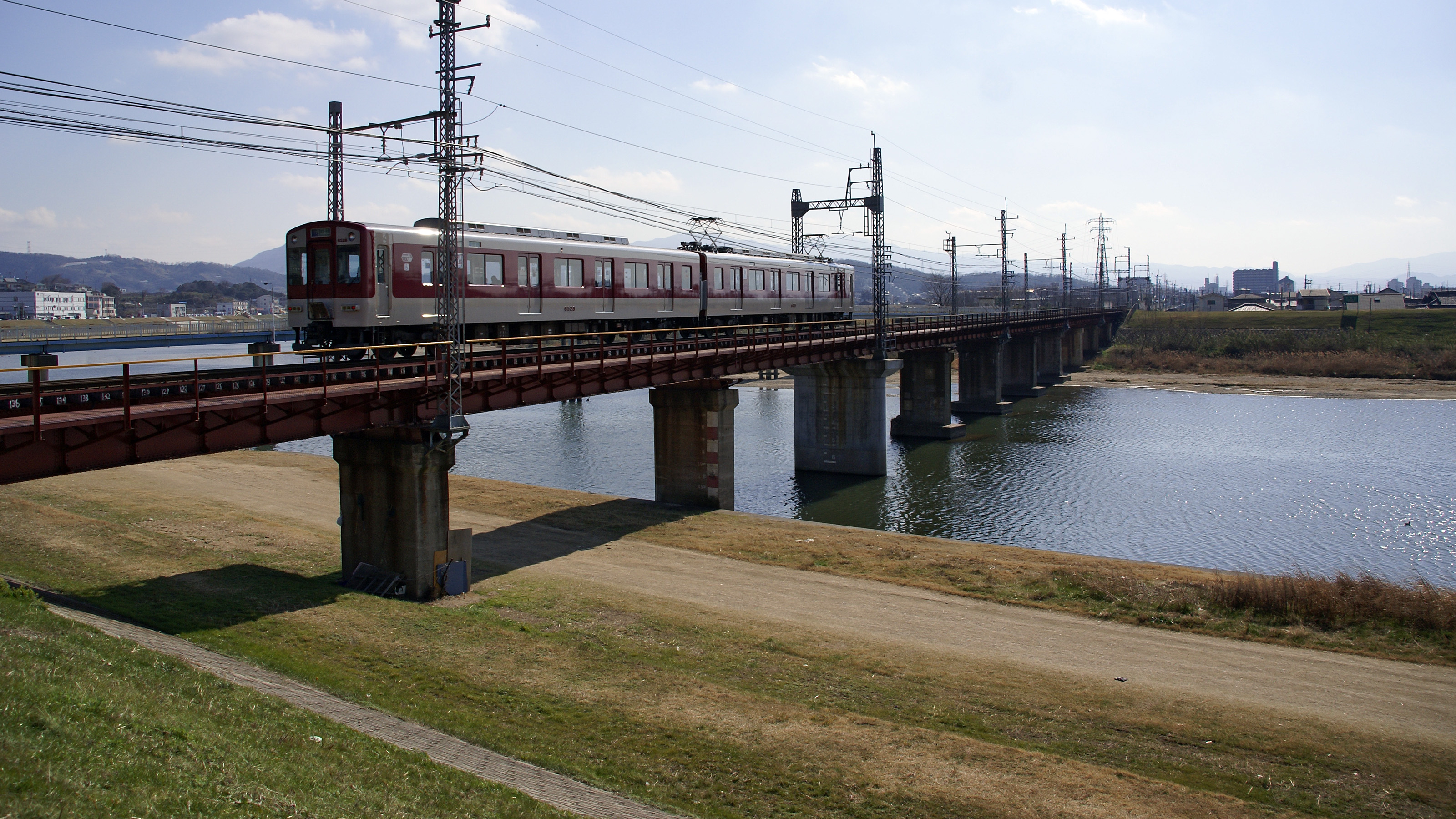 Yamato River at Kashiwara, Osaka, Japan